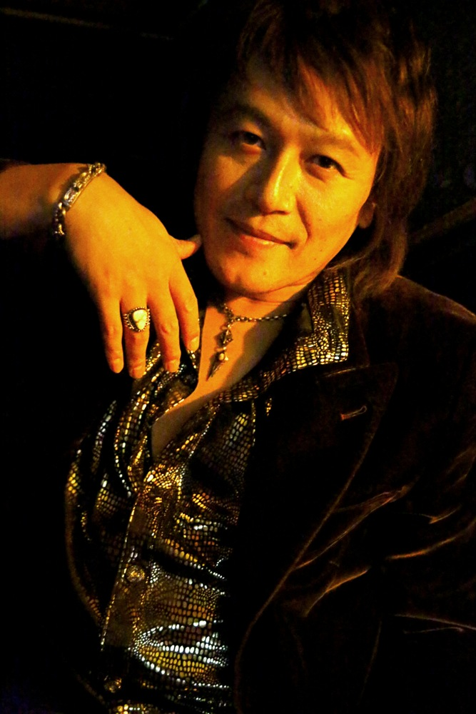 Masaki"mackie"Kawakami